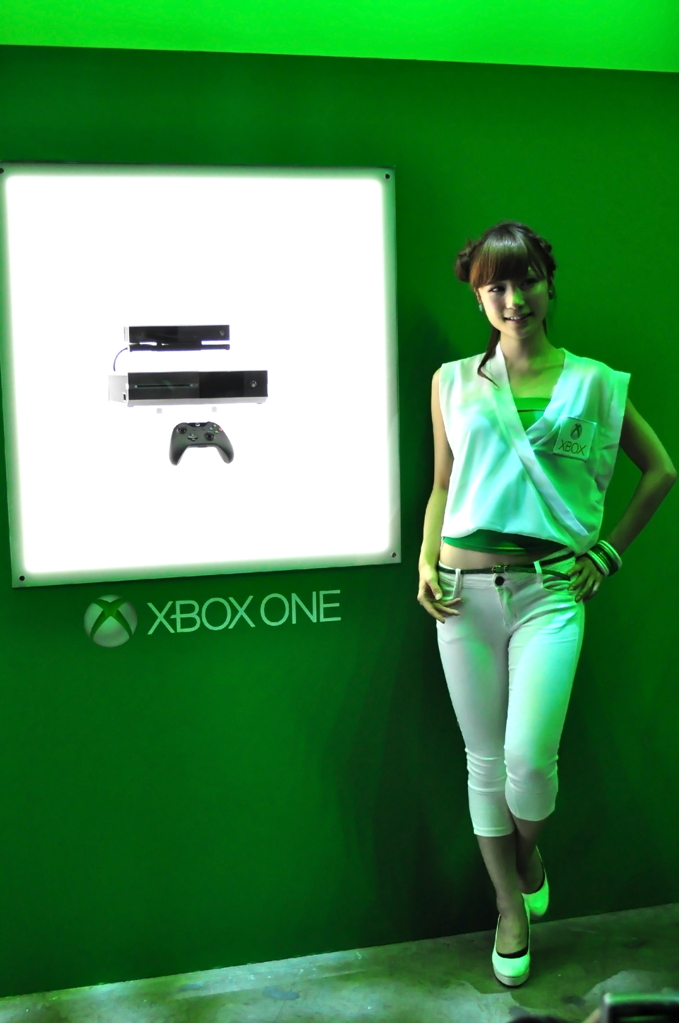 東京ゲームショウ2013 Xboxブース 岩田明子